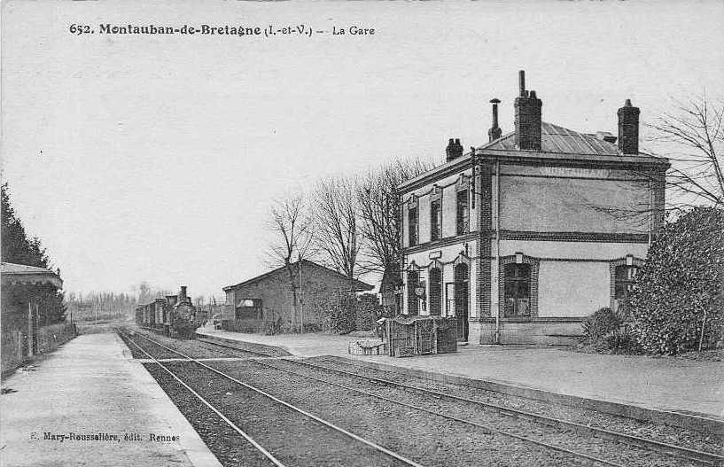 L'intérieur de la gare vers 1900, avec le bâtiment voyageurs, une halle à marchandises, un abri de quai, les deux voies et un train vapeur en desserte.